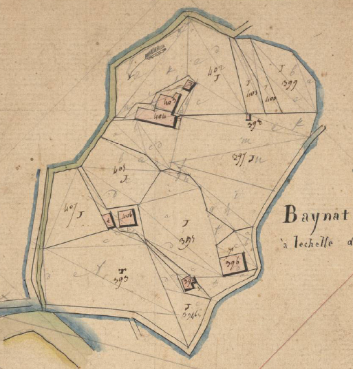 El Veînat d'en Paulí de Sant Llorenç de Cerdans en el Cadastre napoleònic del 1812 (Arxius Departamentals dels Pirineus Orientals)